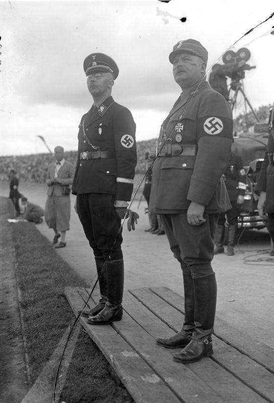 Der Stabschef der S.A. Ernst Röhm, wurde auf Vorschlag des Reichskanzlers zum Reichsminister ohne Geschäftsbereich ernannt! Der vom Reichspräsidenten zum Reichsminister ernannte Stabschef der SA, Ernst Röhm, welcher somit Mitglied der Reichsregierung wurde. Der große SS-Schutz-Staffel-Appell der Gruppe Ost der N.S.D.A.P. in Berlin, an welchem 10000 SS-Männer teilnahmen. Die SS-Männer kampierten in Zelten in einem Lager in Döberitz bei Berlin! [Text Bild 102-14886; August 1933]